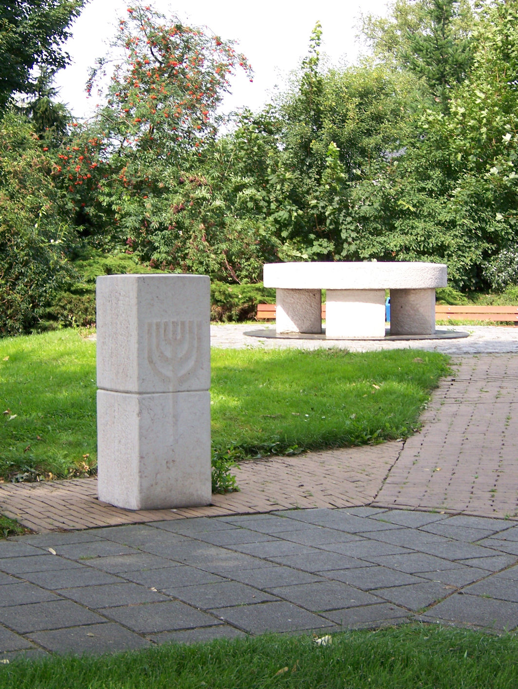 Joods monument (1990) Stationsweg to 4, 9601BH, Hoogezand, gemaakt door Lucas Klein.